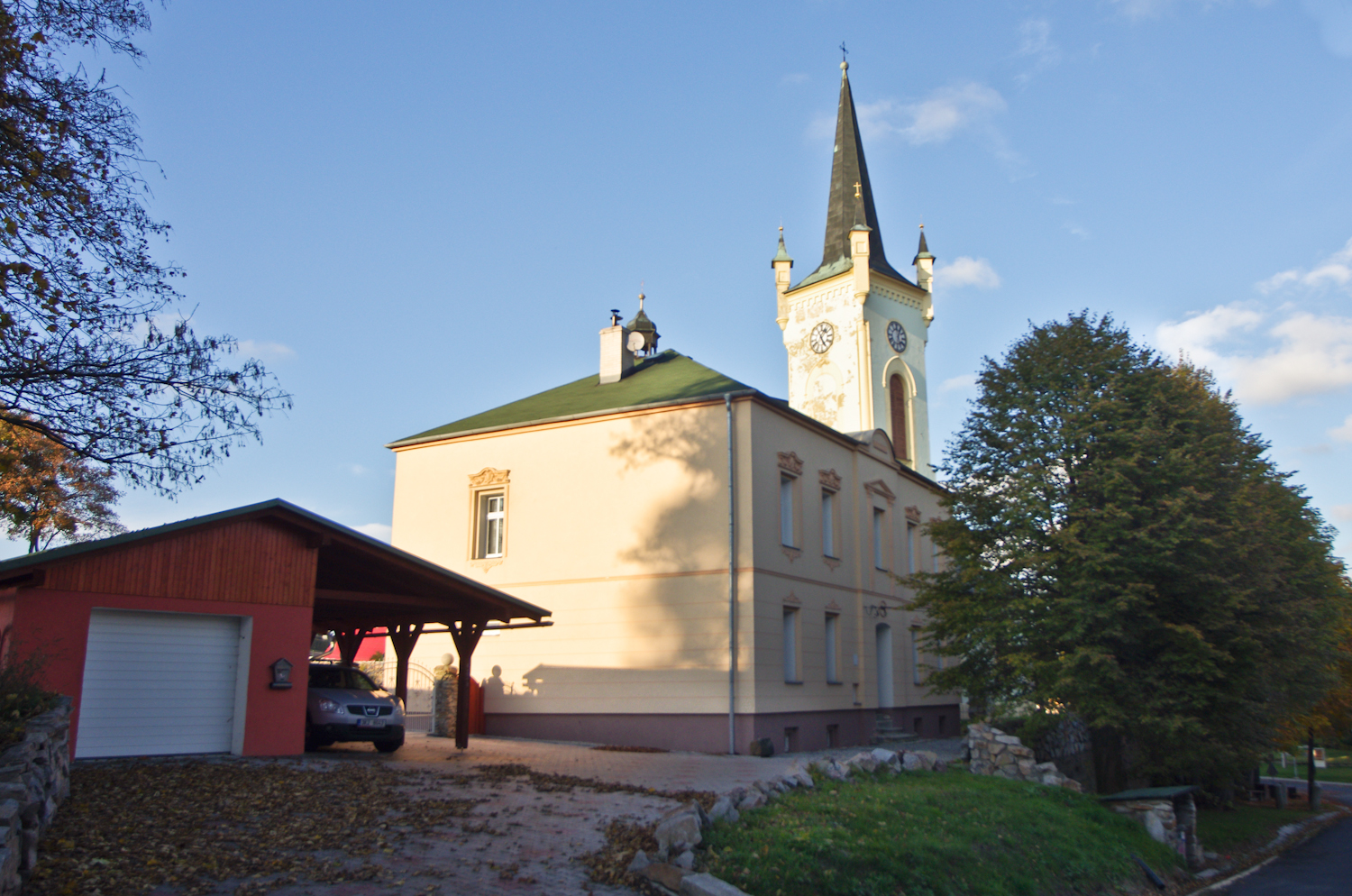 Kostel sv. Petra a Pavla (Krajková), nám. Karla IV., Krajková